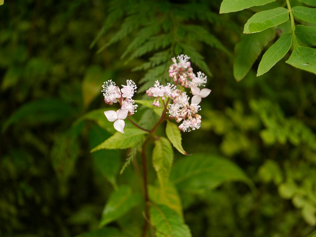 Cardiandra alternifolia：クサアジサイ 20015/09/05 和歌山県田辺市：Tanabe City. Wakayama Pref. Japan